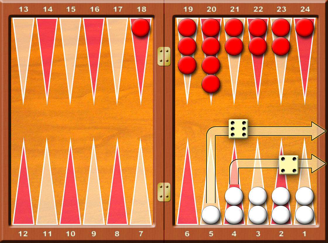 Backgammon--Dadi_6e4-Due pedine tolte dalla tavola Francesco De Lorenzo (fr.dl CHIOCCIOLA tiscali.it) è l'autore di questa immagine e l'ha rilasciata sotto licenza GFDL